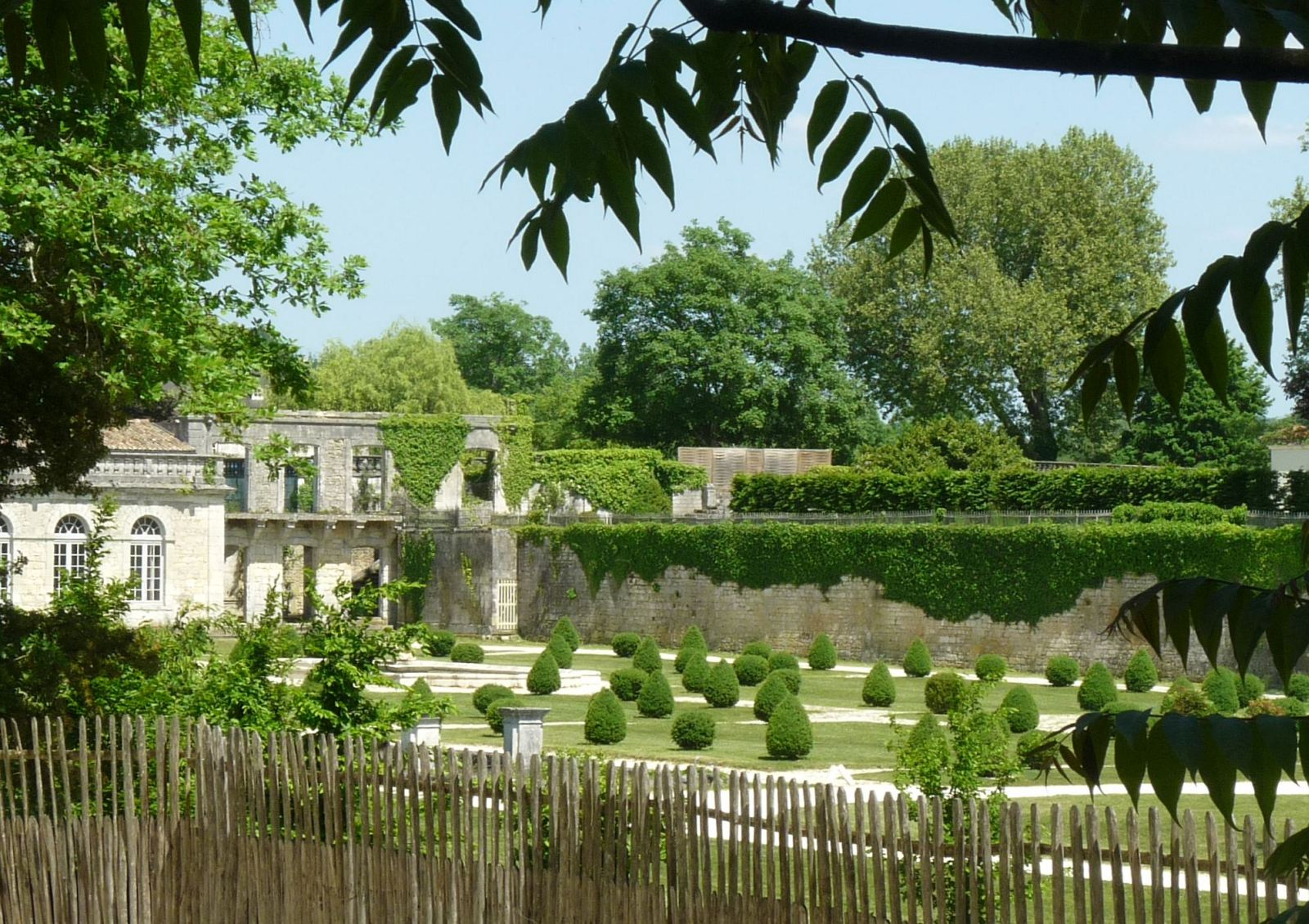 Jardins de l'Orangerie du château de La Rochebeaucourt, Edon, Charente, France